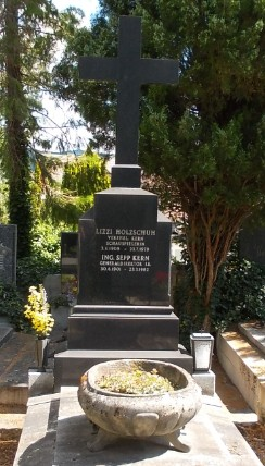 Grab Lizzi Holzschuh-Helenenfriedhof Baden